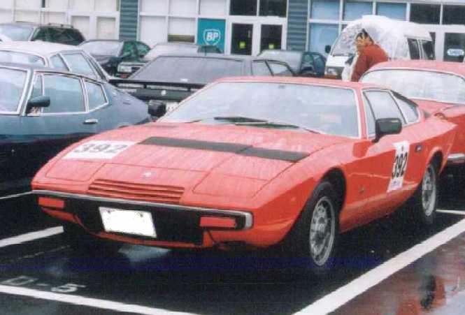 URL: Tag: Img:[IMG]